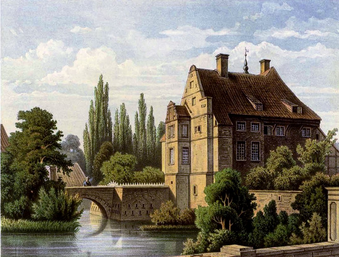 Haus Vorhelm, Kreis Beckum, Provinz Westphalen, Lithografie aus dem 19. Jahrhundert